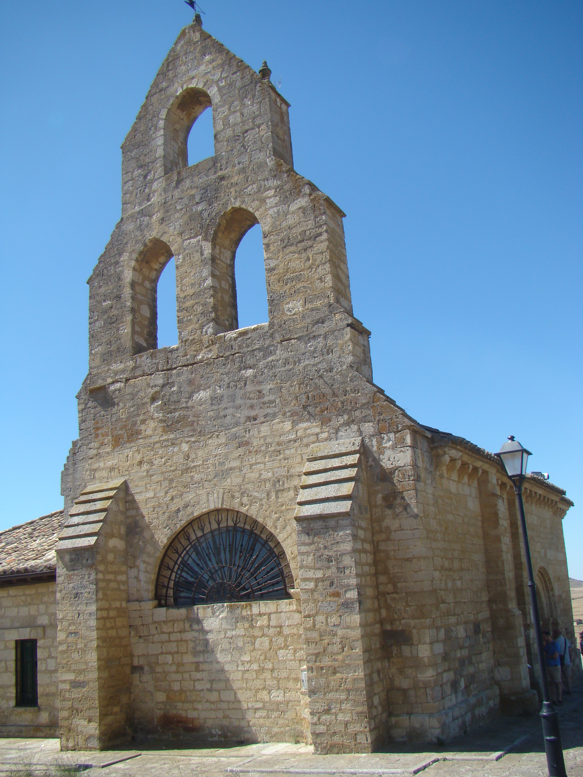 Támara de Campos (Palencia, España). Espadaña del edificio románico que fue la iglesia de la Orden de San Juan de Jerusalén.